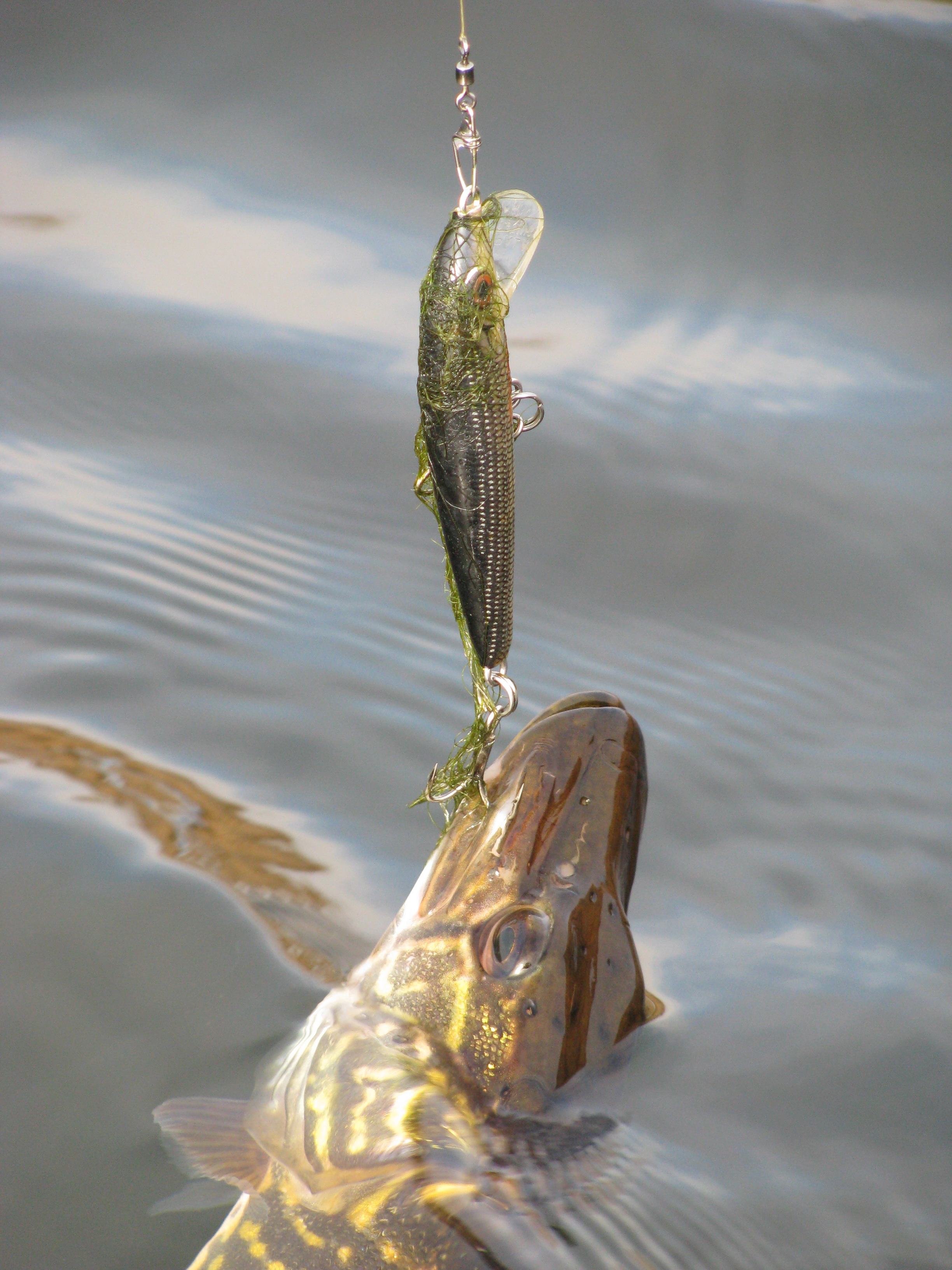 Щука пойманная на Original Floater